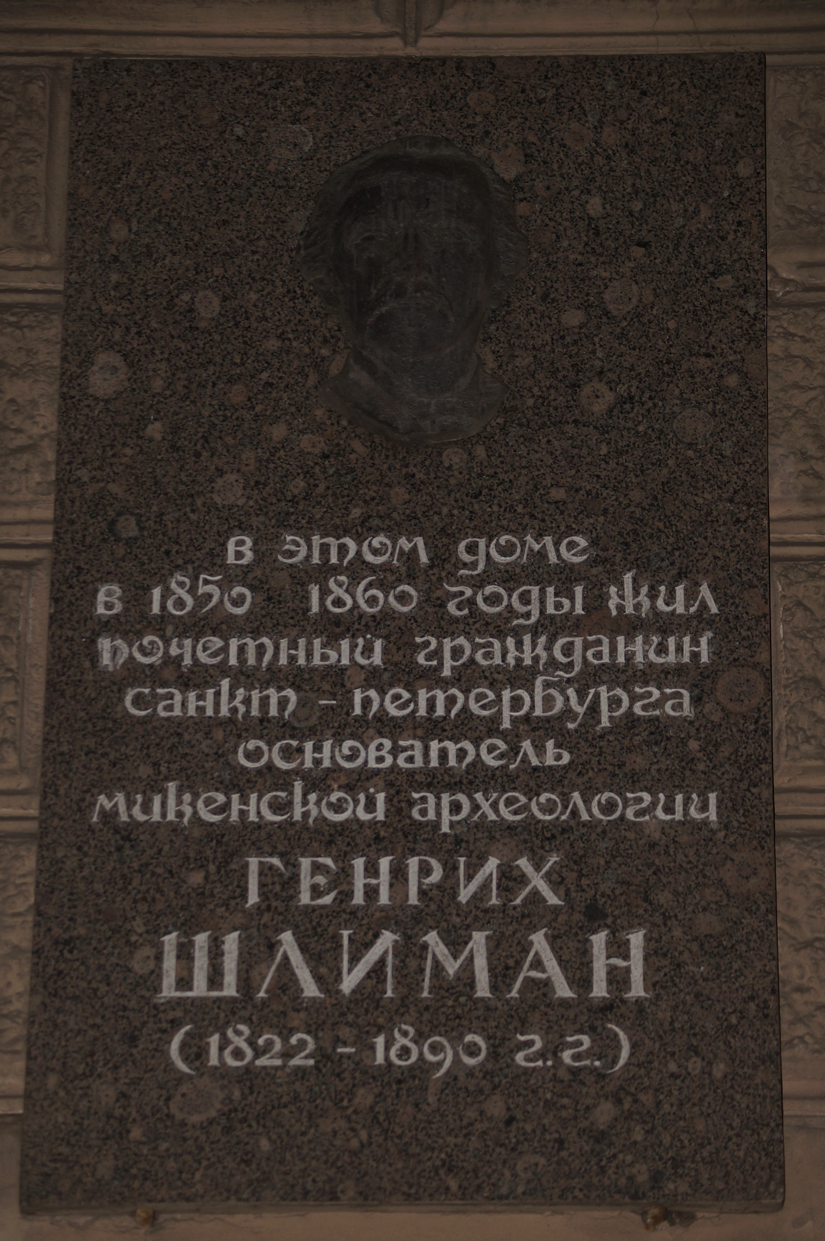 Мемориальная доска. Дом Шлимана.